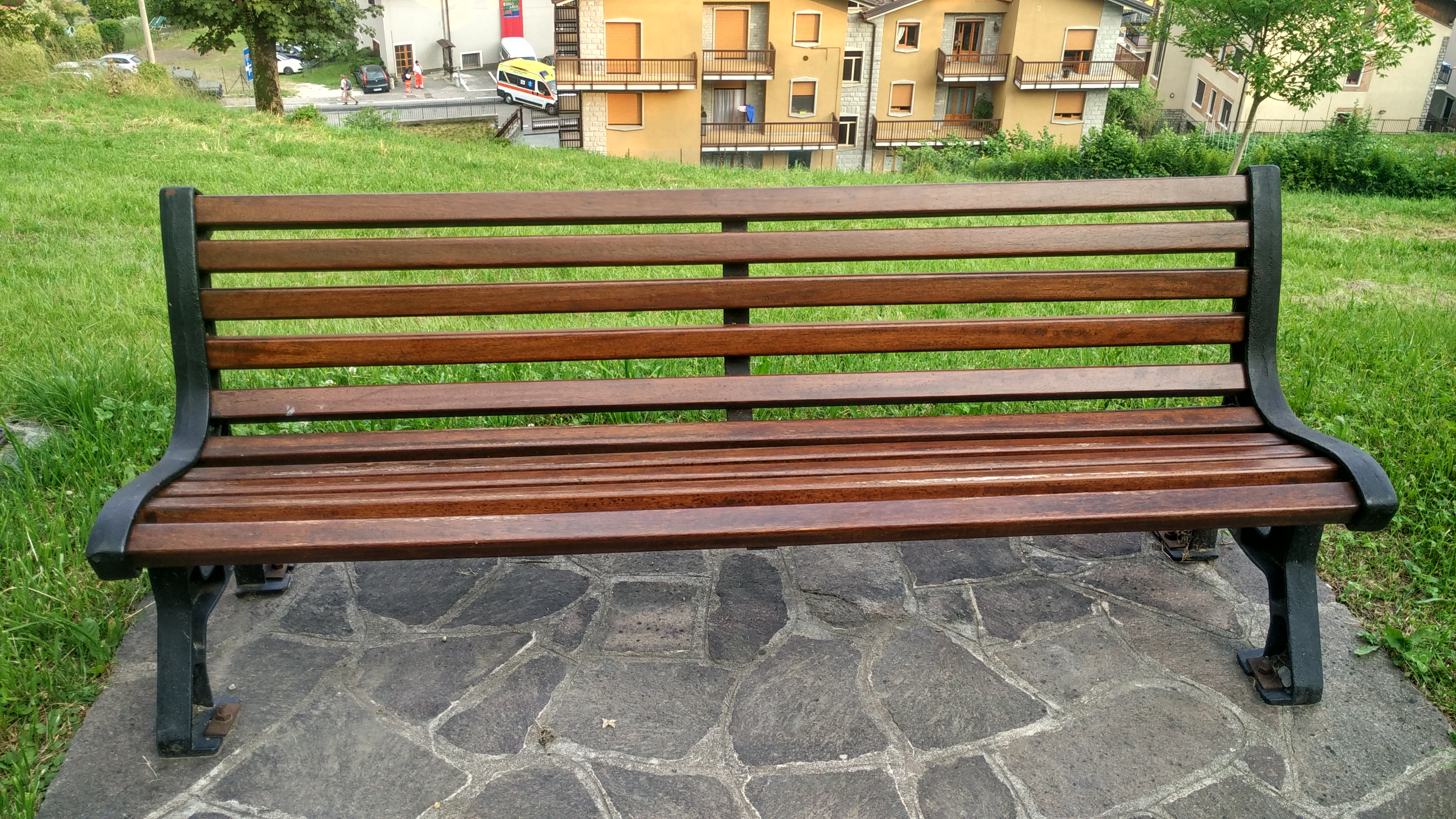 எசினோ லாரியோவில் உள்ள மரவிருக்கை.